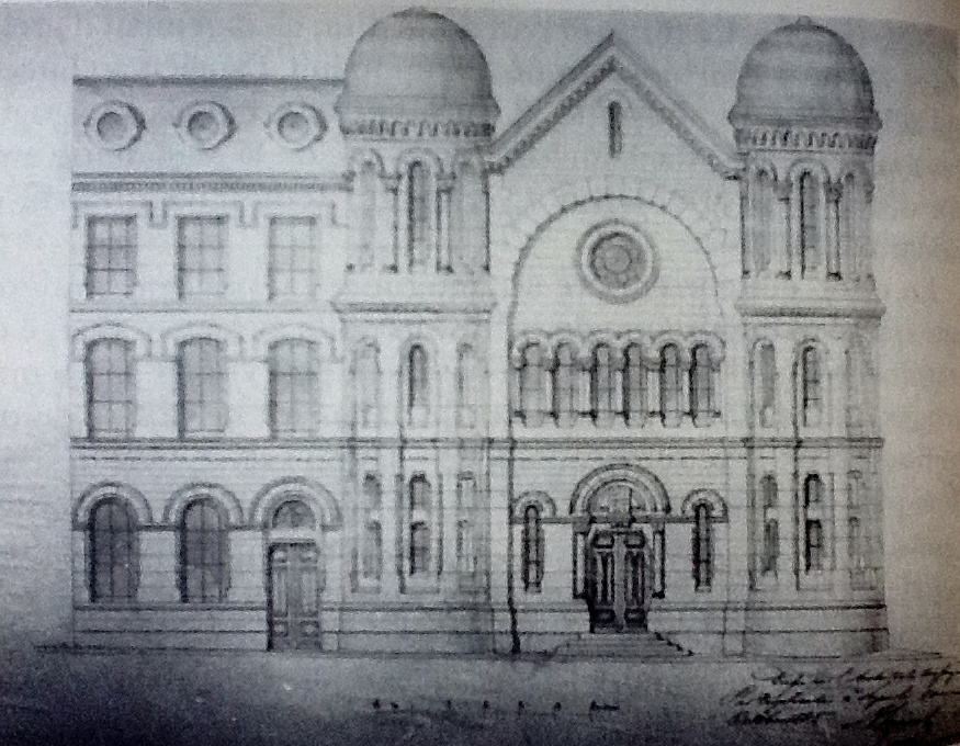 Plan de la synagogue du square Saint-Amour de Besançon, dressé par l'architecte Pierre Marnotte avant 1867.